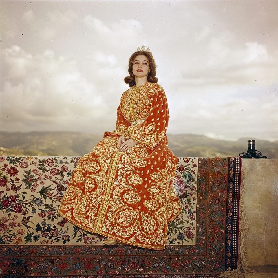 الأميرة لمياء الصلح ابنة رياض الصلح، رئيس وزراء لبنان، وتزوجت من الأمير الراحل مولاي عبد الله بن محمد في نوفمبر 1961.